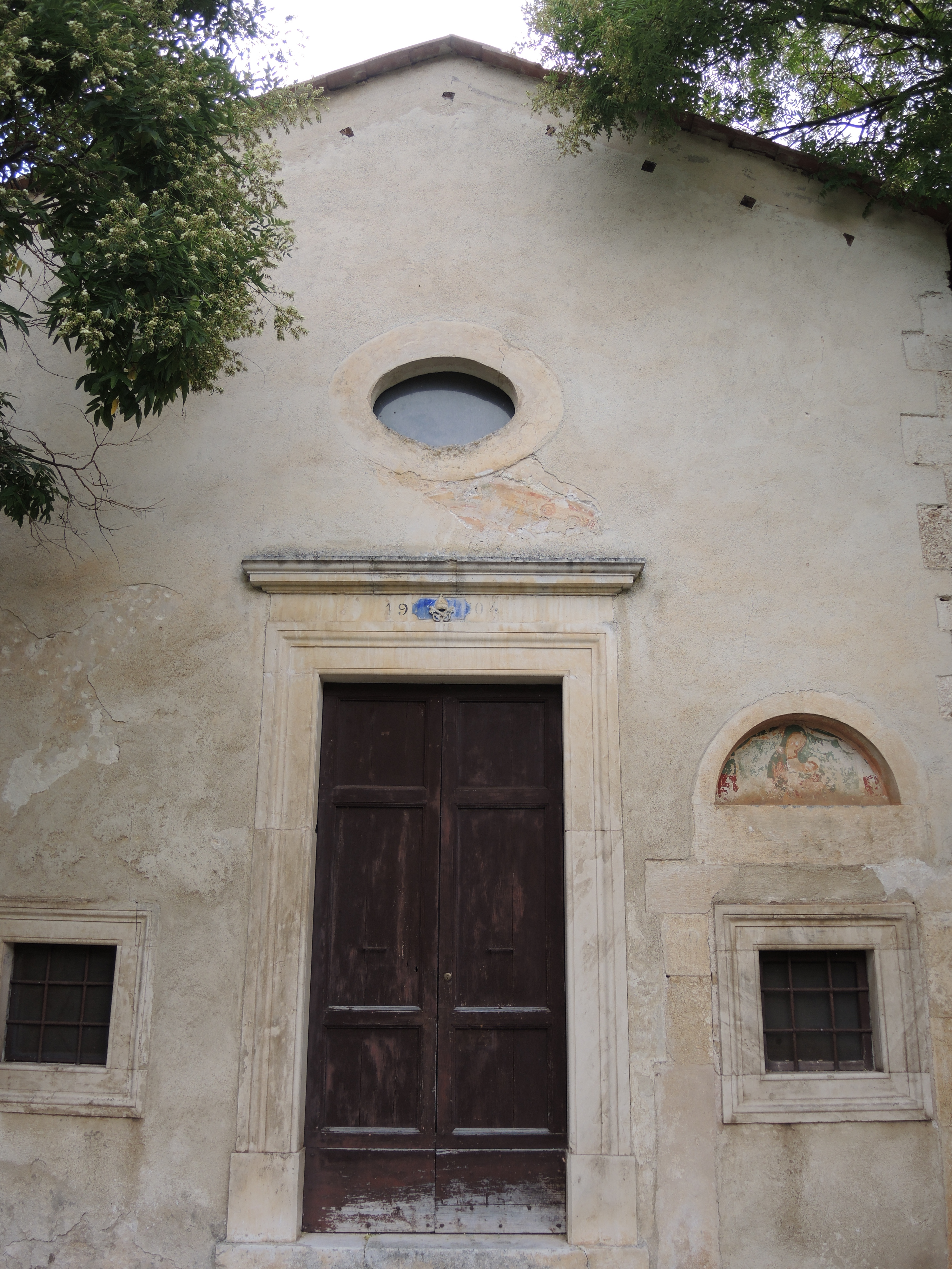 Caporciano - Chiesa di San Pietro in Valle